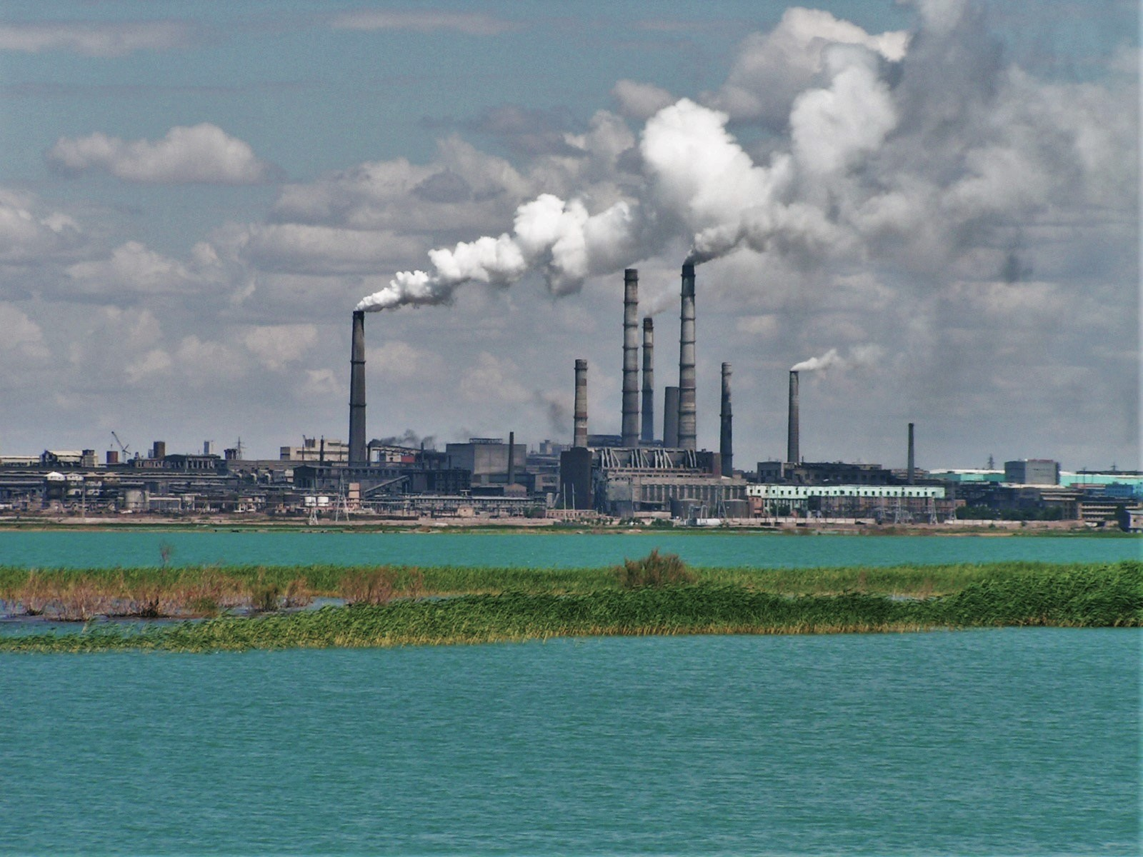 Fabrika in Balkhash